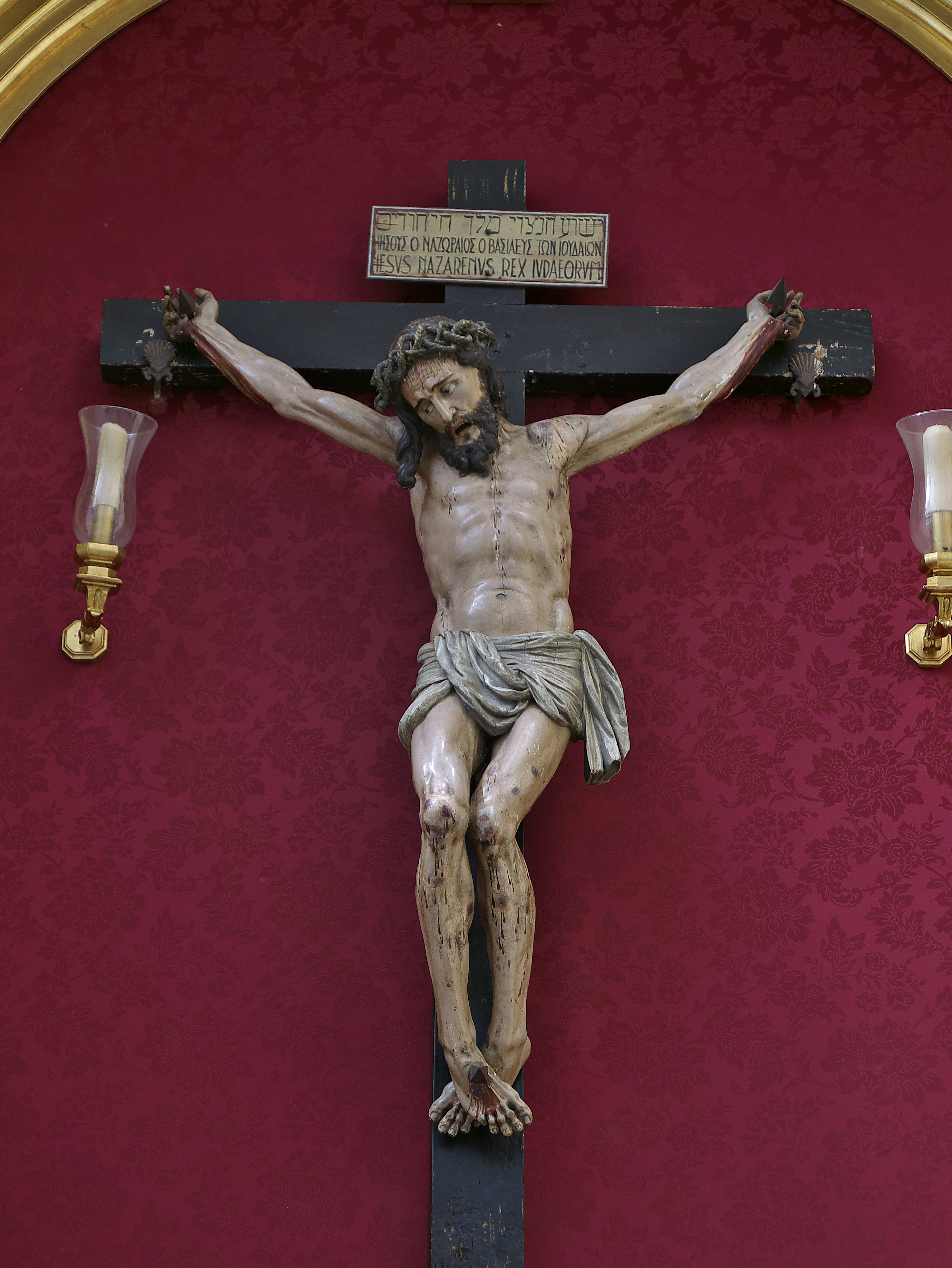 Talla del siglo XVII titular de la Hermandad de Nuestro Padre Jesús de la Promesa.